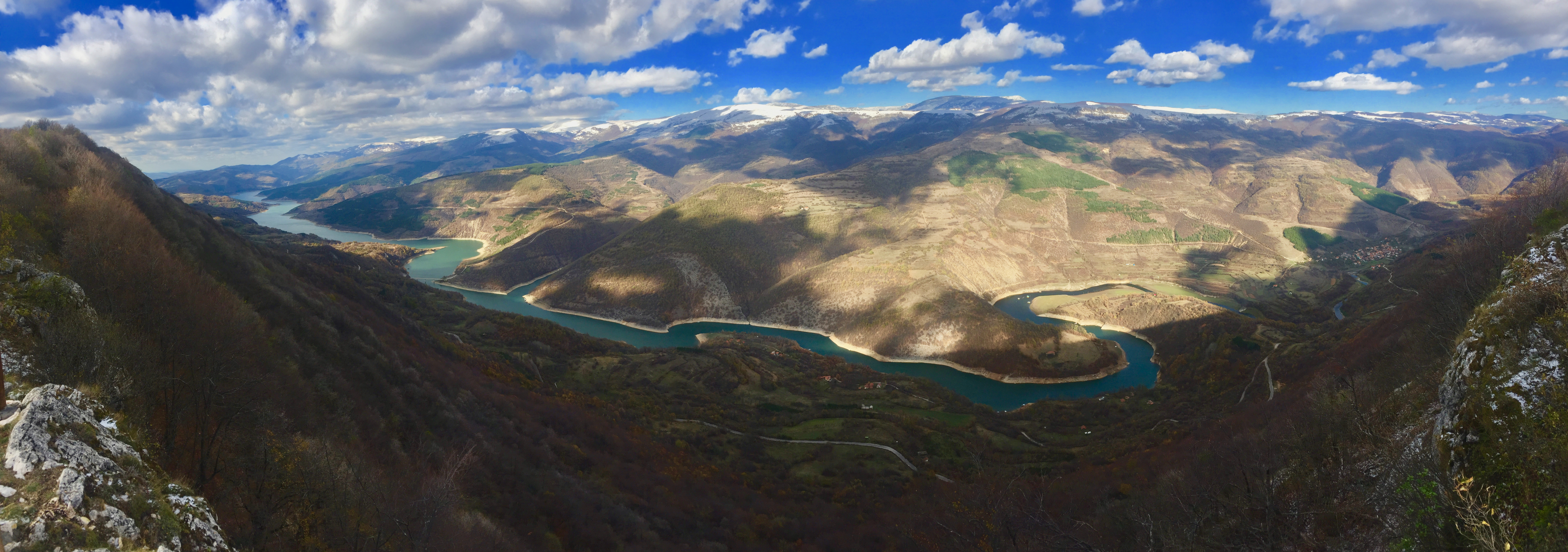 Srpski (latinica): Kozji kamen (1 181 mnv) se nalazi u Istočnoj Srbiji iznad Zavojskog jezera i jedan je od vrhova planine Vidlič. Od Pirota je udaljen oko 18 km i do njega se stiže putem koji vodi za selo Rsovci, a kojim se nakon 12 km od Pirota stiže do Planinarskog doma i Hotela Stara.